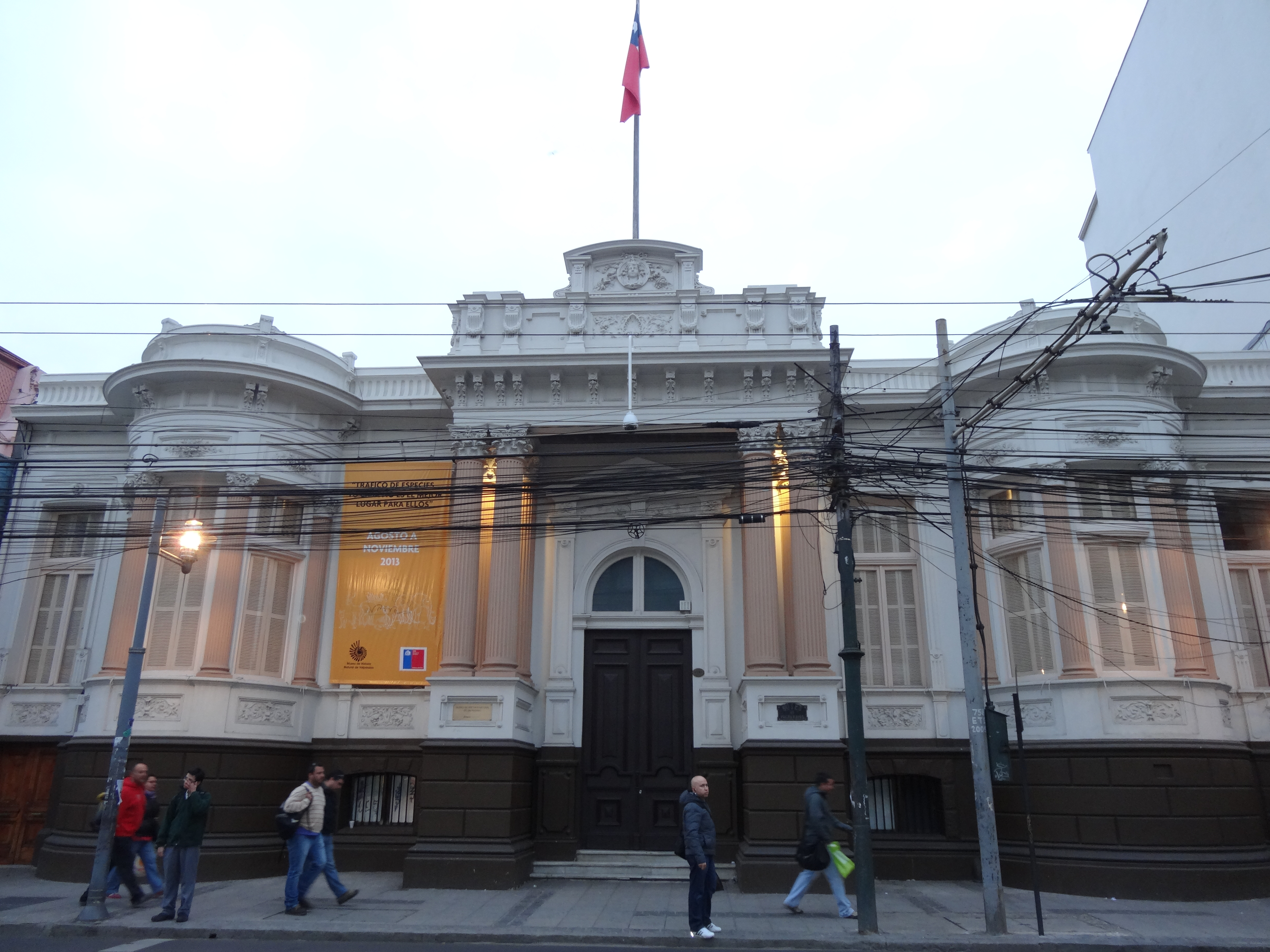 Palacio Lyon This is a photo of a national monument in Chile: 762